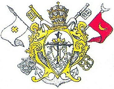 Escudo de la Hermandad del Rosario de Granada